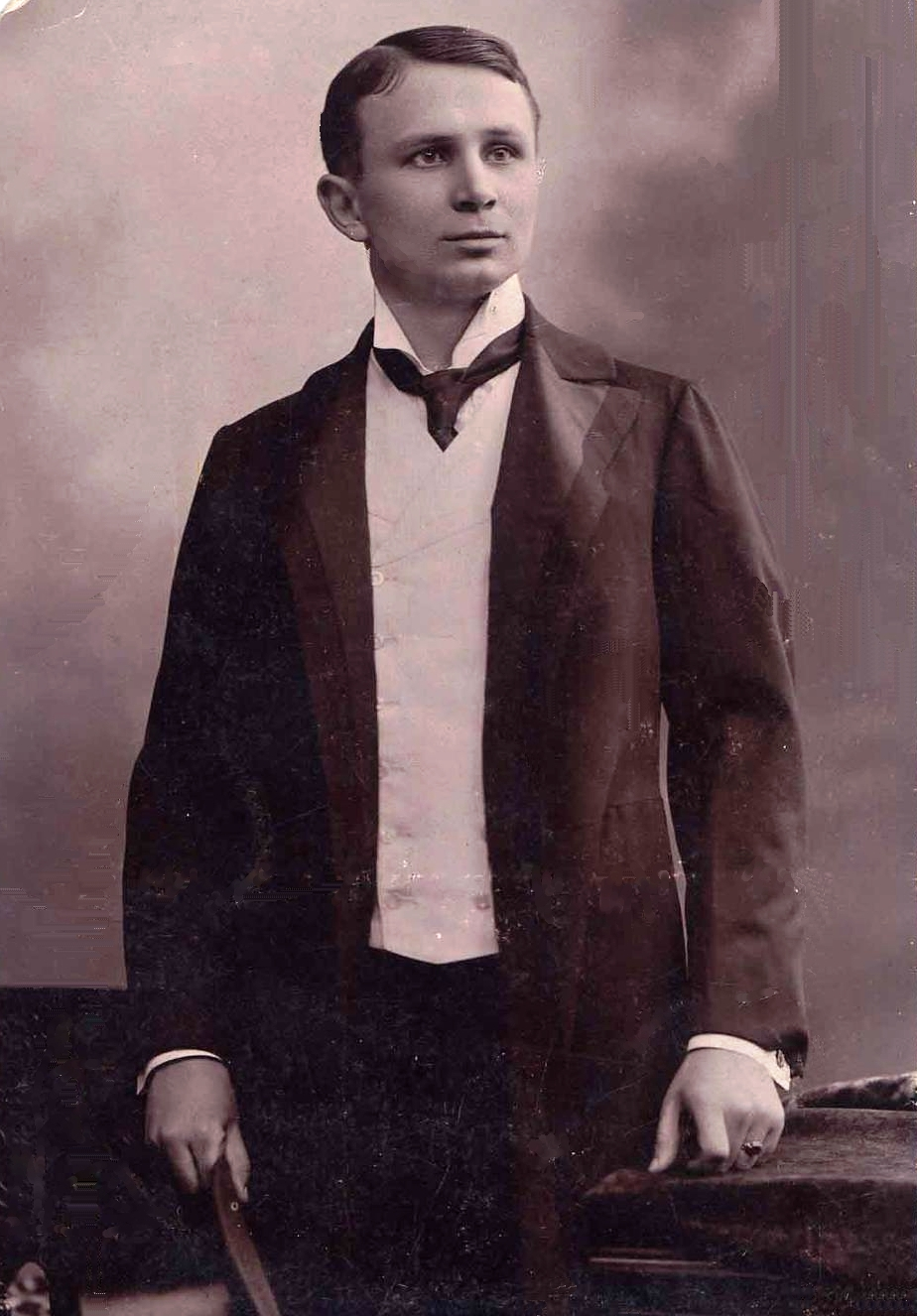 Kürti József magyar színész.